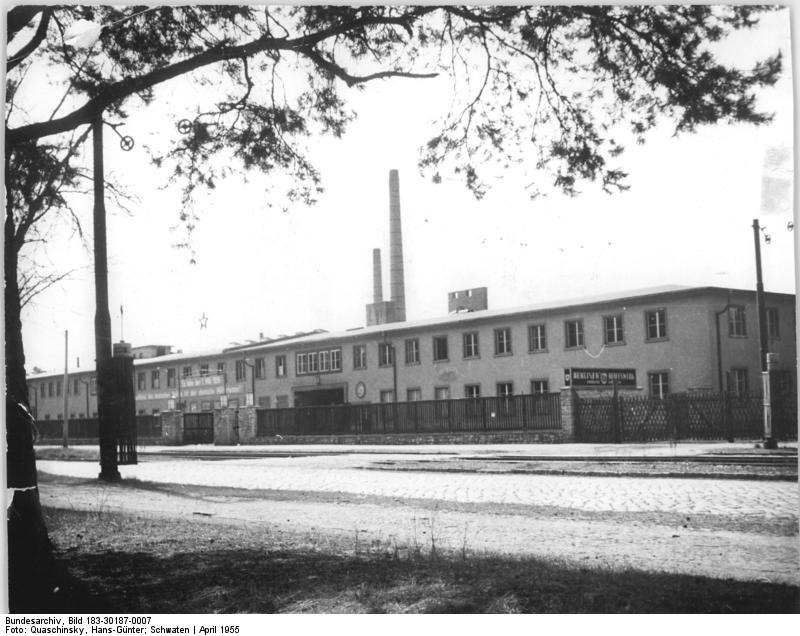 Berlin-Schmöckwitz, Reifenwerk Zentralbild Quasch-Schw. 27.4.1955 Vor der VIII. Internationalen Friedensfahrt Prag-Berlin-Warschau Städte und Gemeinden in der DDR, durch die unsere Friedensfahrer fahre werden. UBz: Das größte Berliner Reifenwerk in Schmöckwitz.